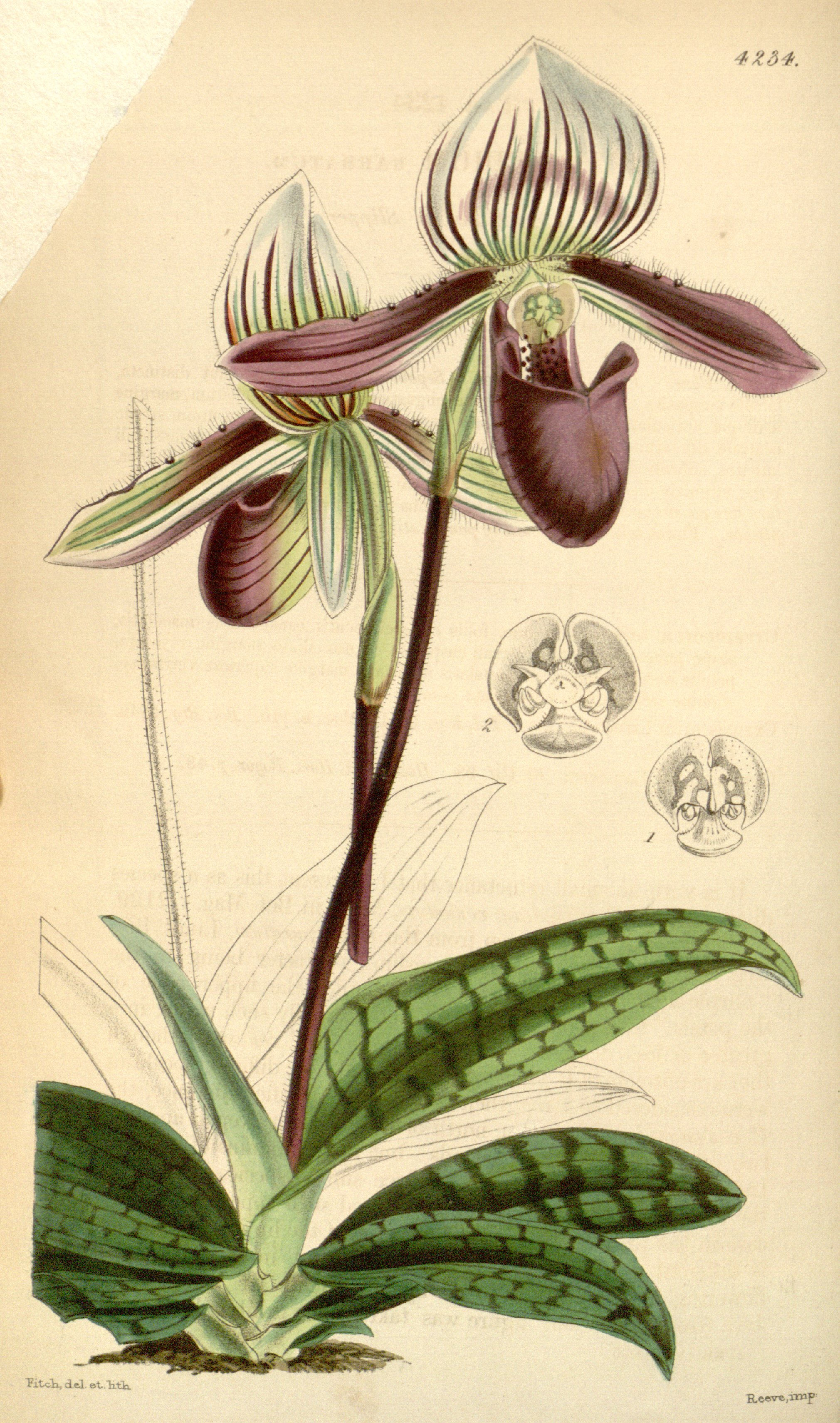 Illustration of Paphiopedilum barbatum (as syn. Cypripedium barbatum)